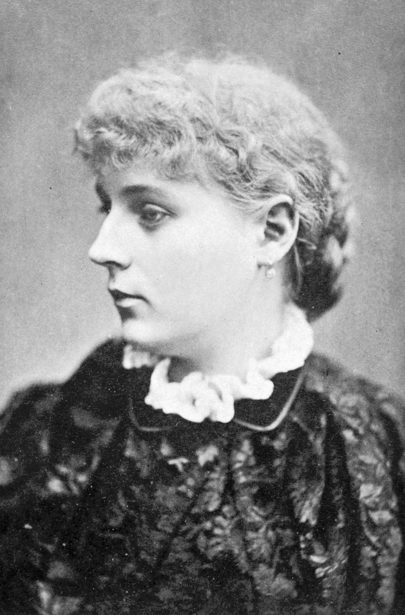 Gerda Grönberg, skådespelare vid Mindre teatern 1883